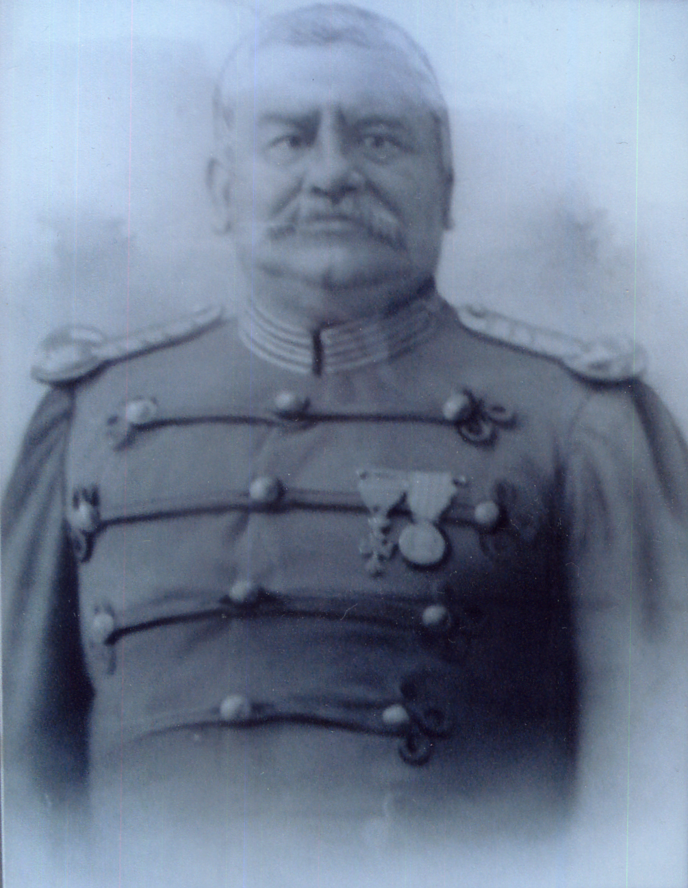 Coronel de Infantaria Francisco Augusto da Costa Martins.